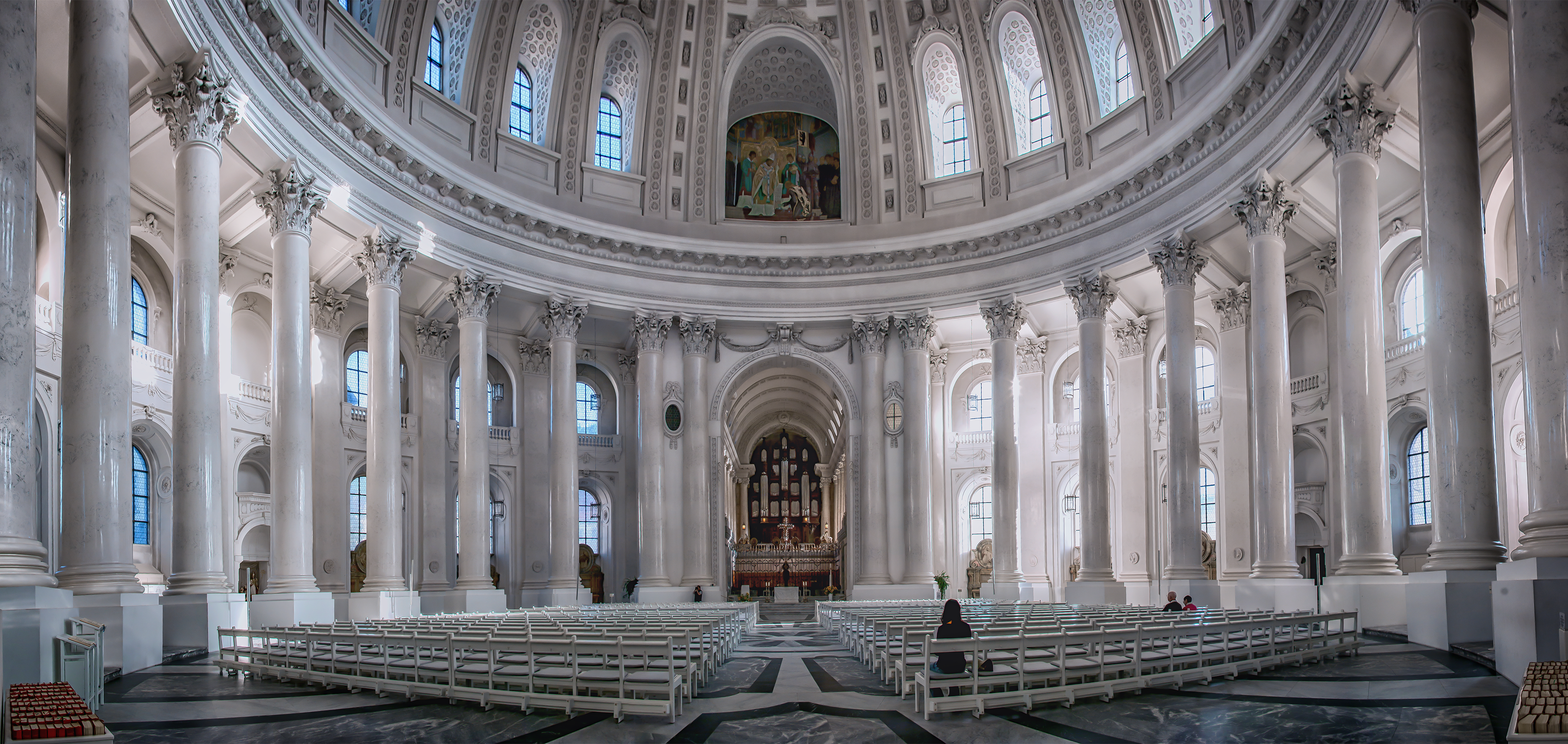 Ein Innenraumpanorama des Doms von St. Blasien